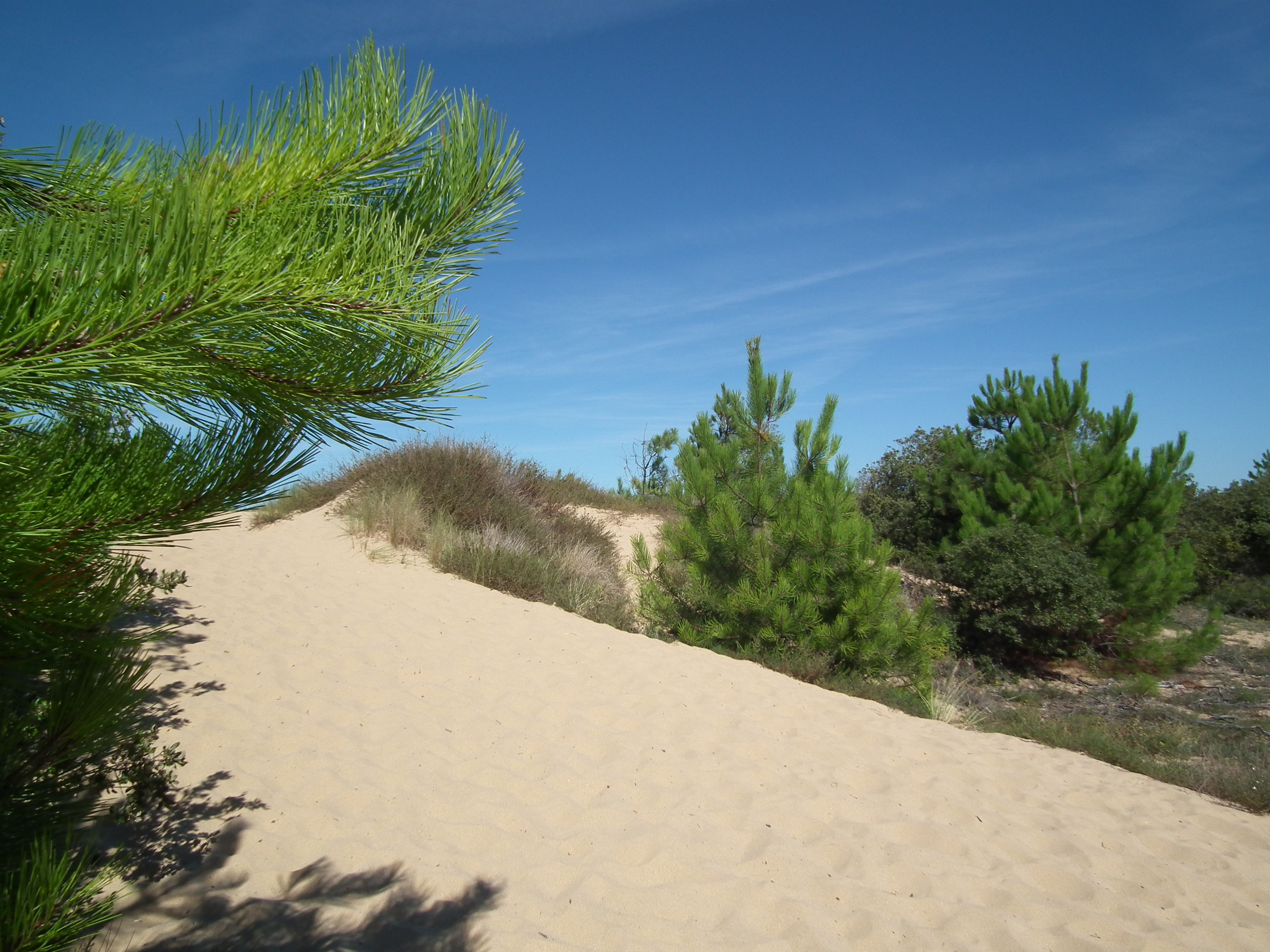 Dune à Boyardville (forêt des Saumonards)